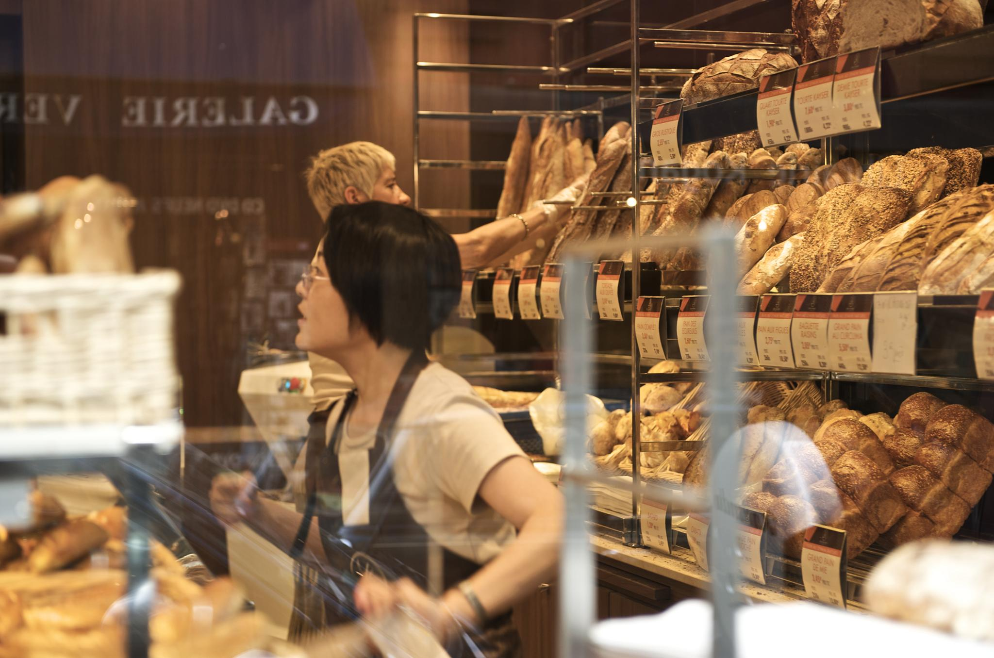 Paris 2008